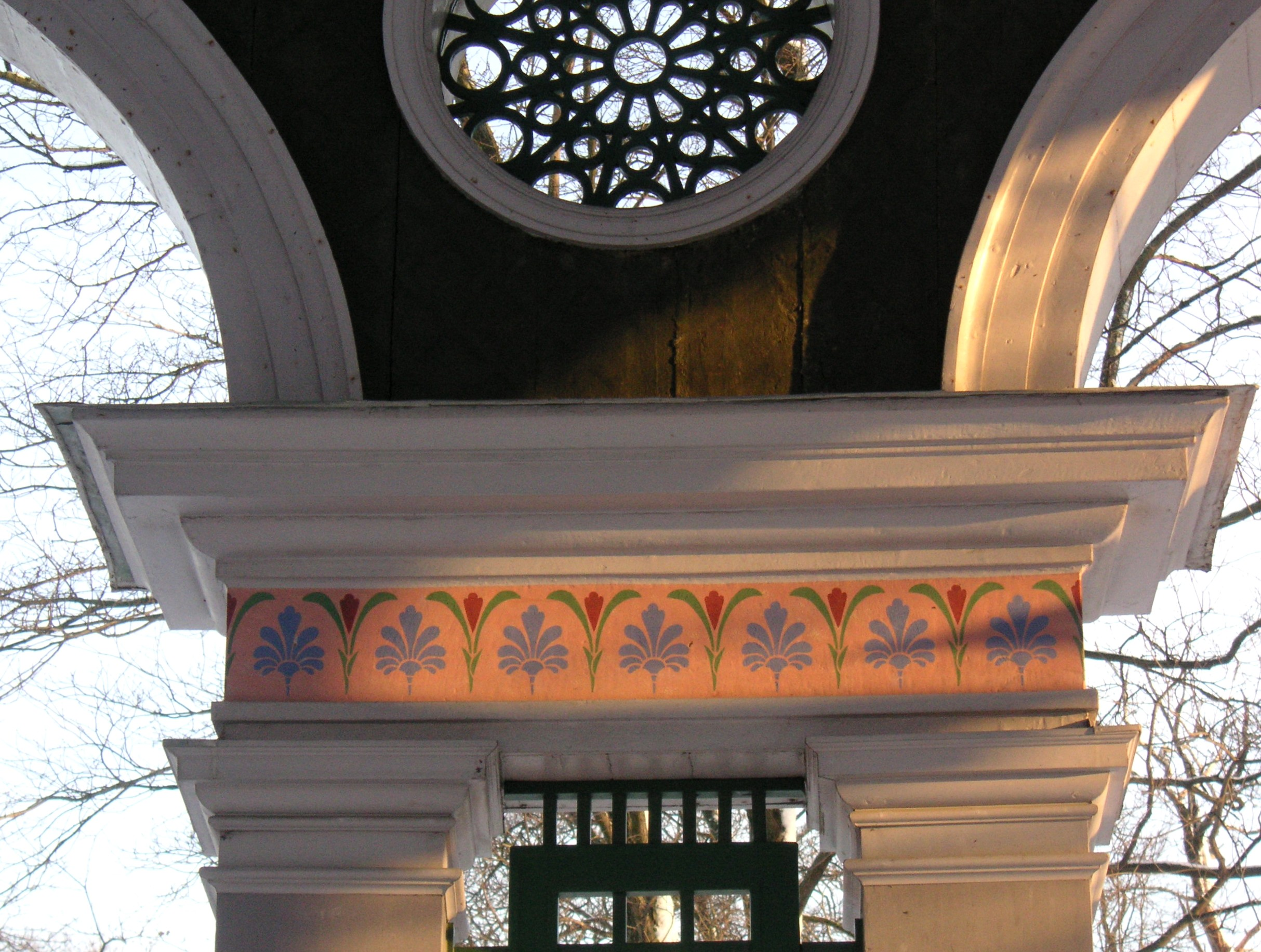 Ekotemplet i Hagaparken